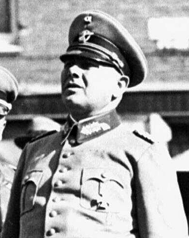 Otto Schumann, Befehlshaber der Ordnungspolizei in den Niederländen von Juni 1940 bis Dezember 1942